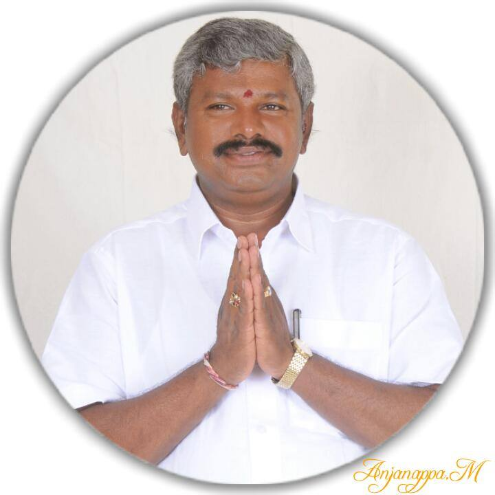 ಕನ್ನಡ: ಬೃಹತ್ ಬೆಂಗಳೂರು ಮಹಾನಗರ ಪಾಲಿಕೆ ಸದಸ್ಯರು